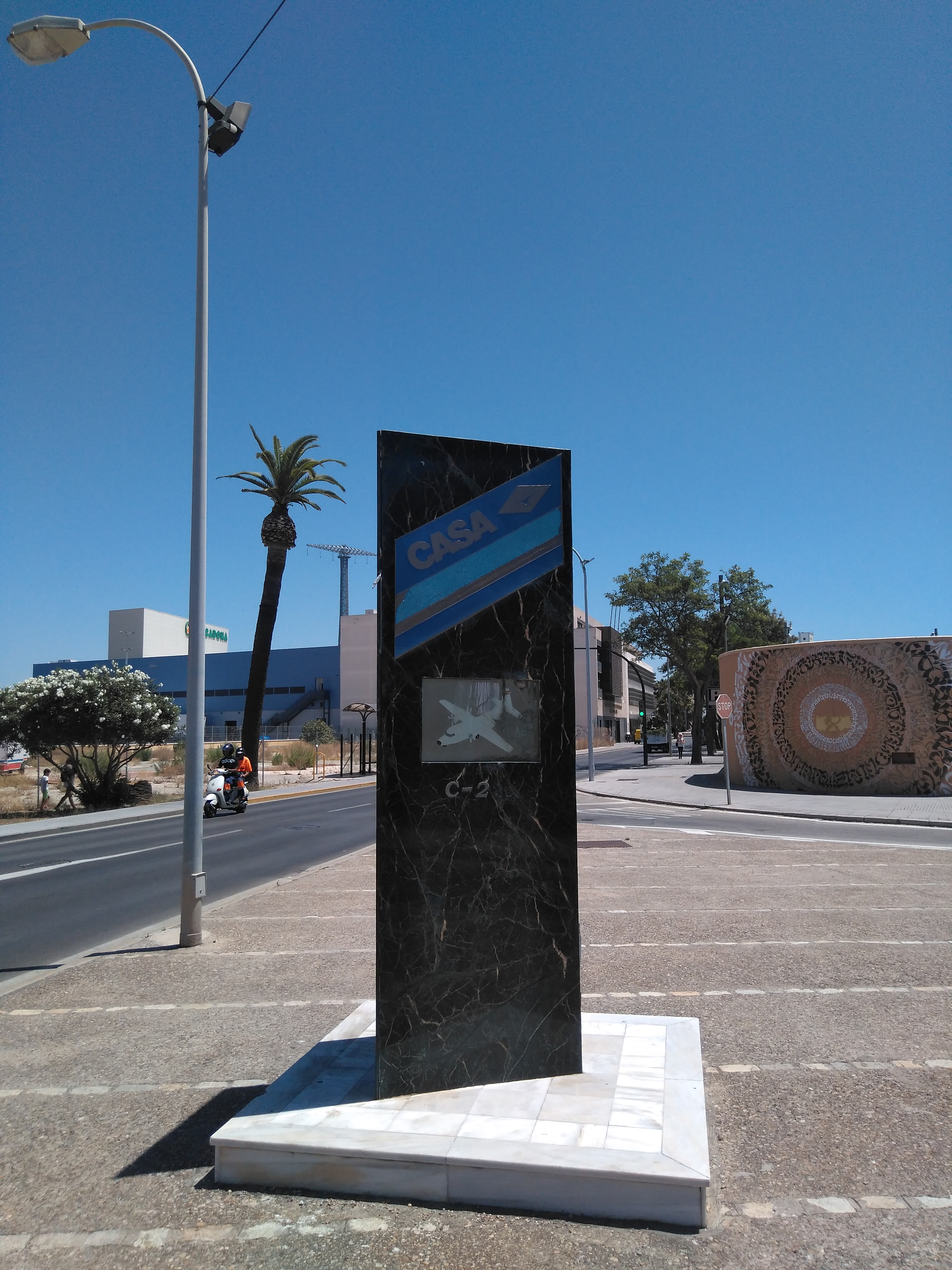 Monumento al C-2 CASA en Campo de aviación de Cádiz (España)